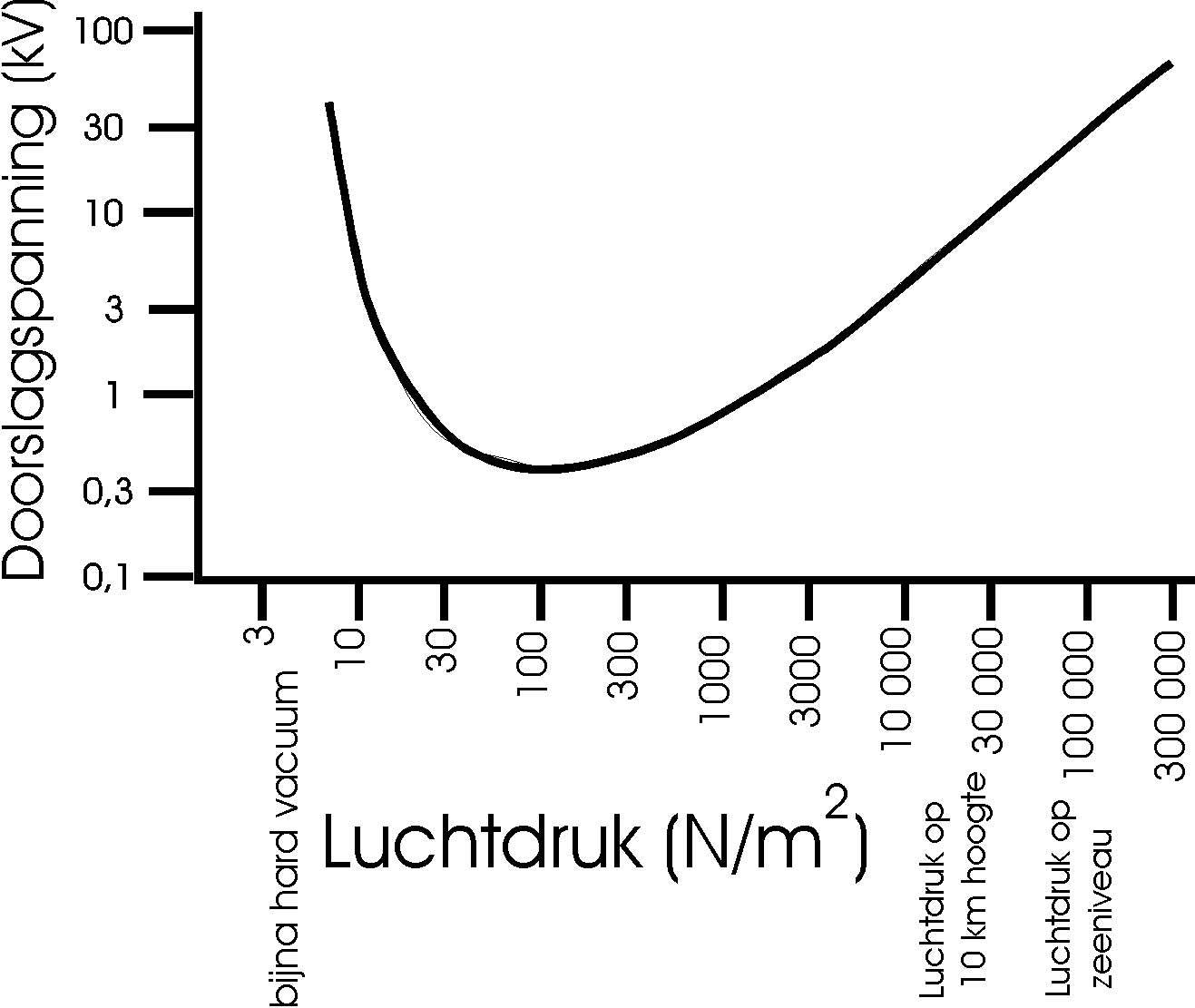 Paschen kurve, doorslagpanning in lucht als functie van de luchtdruk bij elektrodenafstand 1 cm